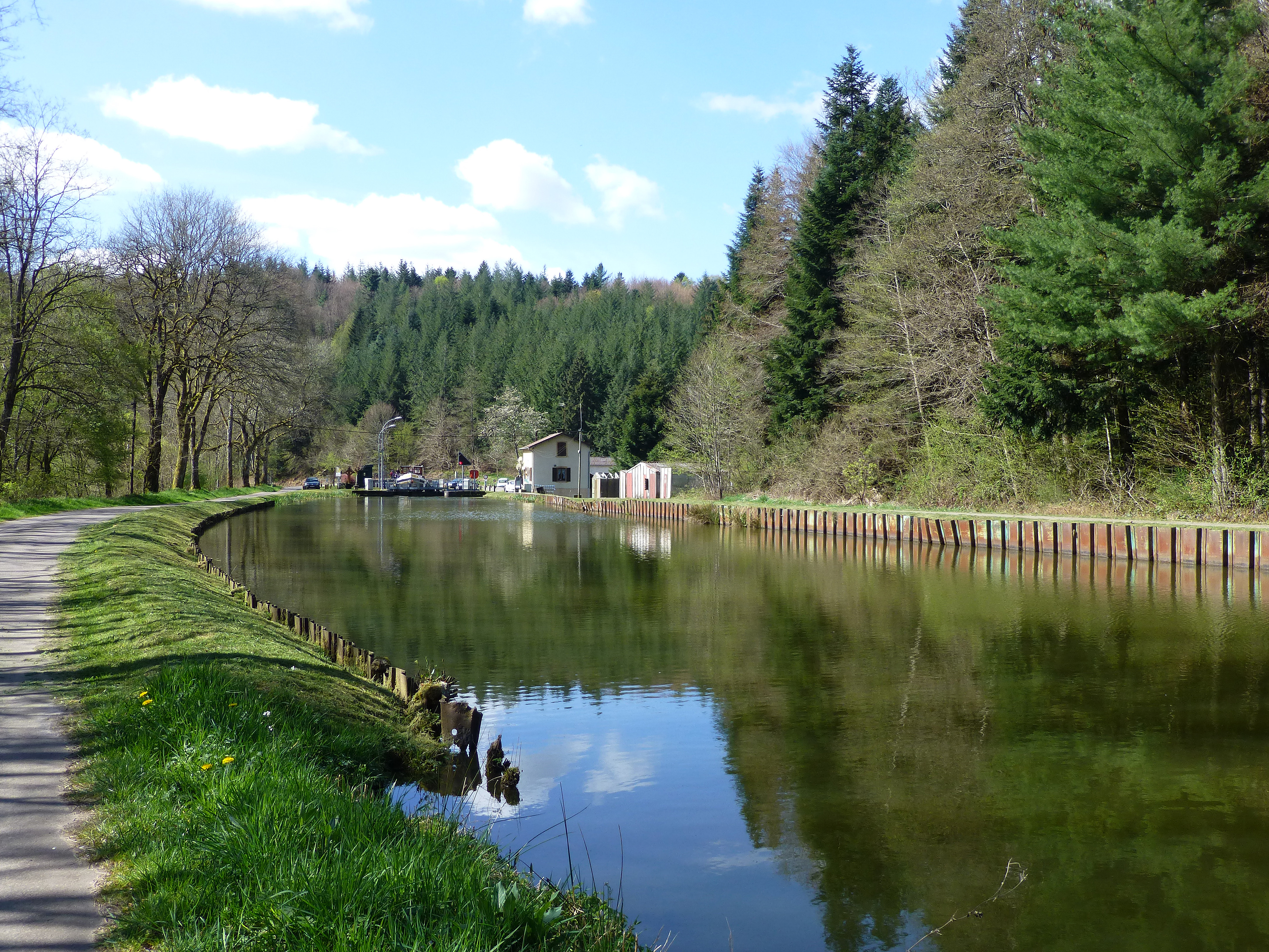 Le canal de l'Est près de Fontenoy-le-Château (Vosges)